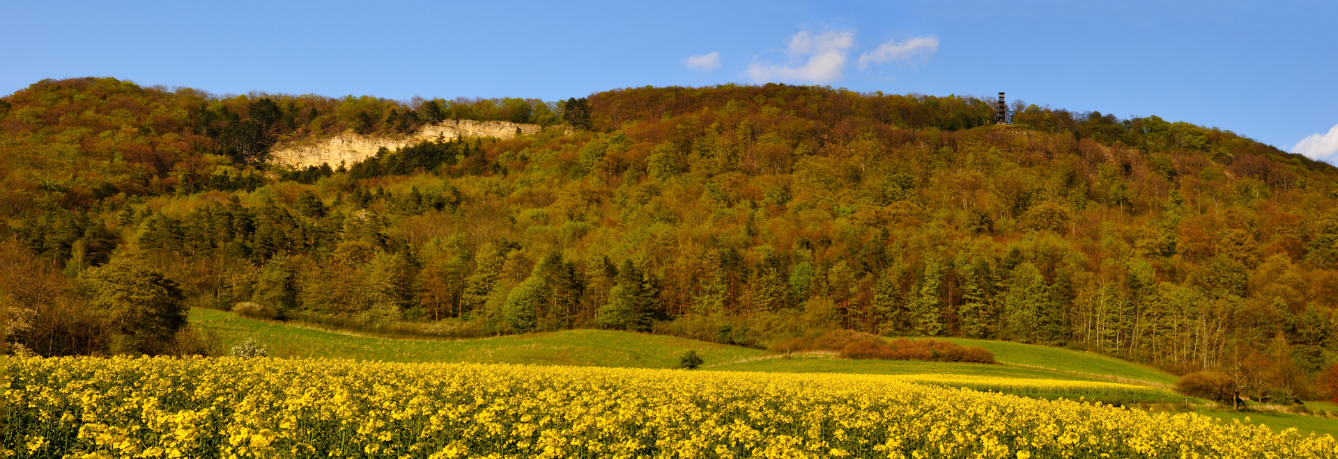 Plesse-Panorama im Wanfrieder Werratal